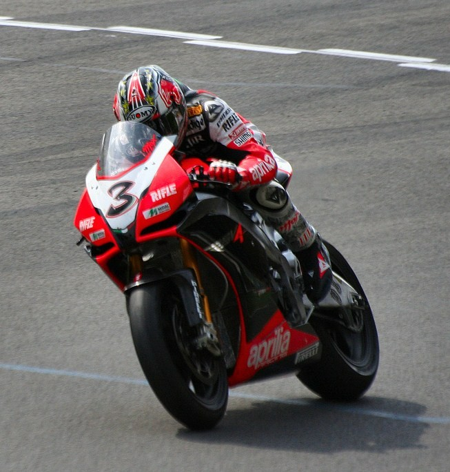 foto Biaggi_RSV4